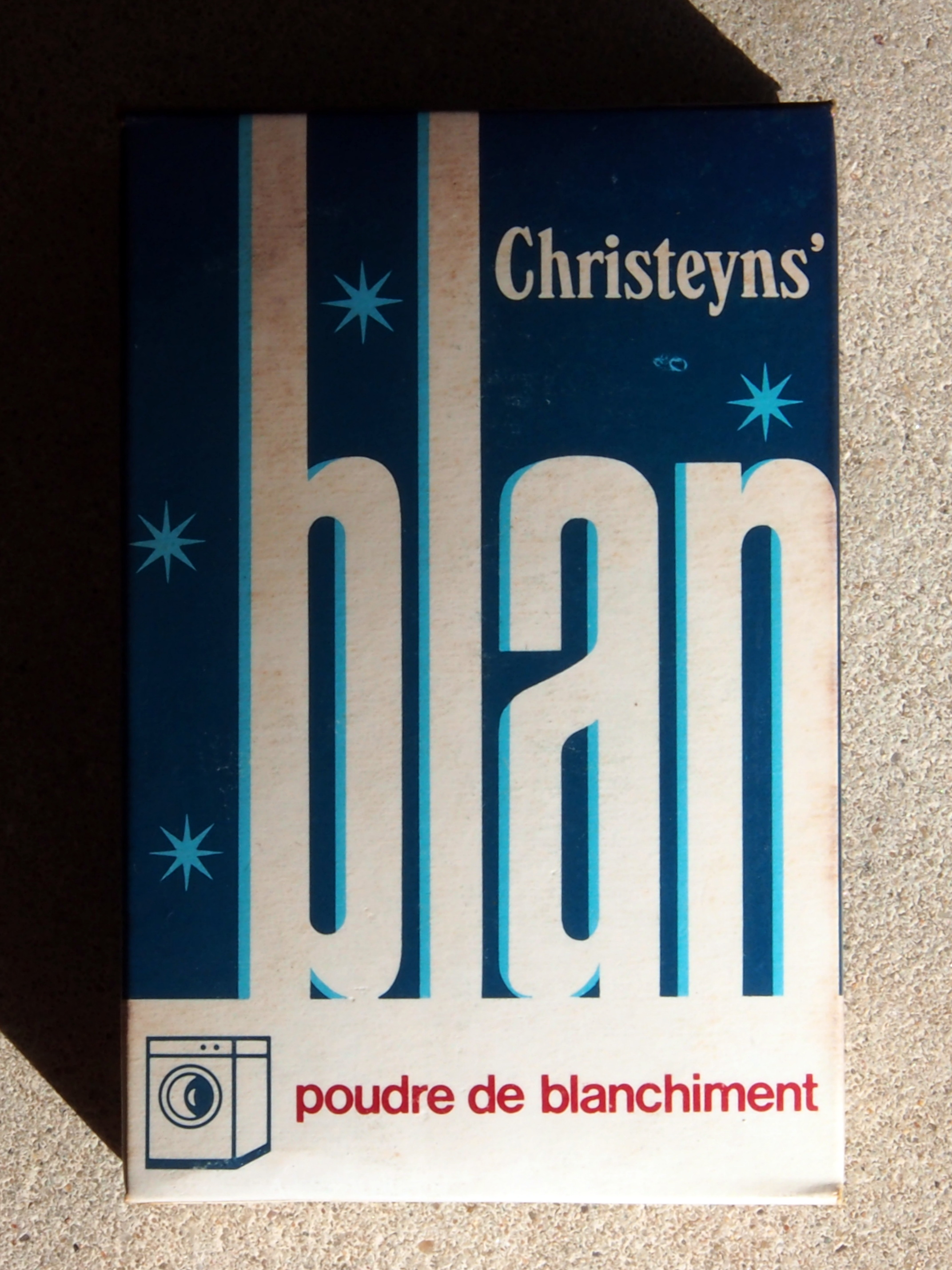 Christeyns' Blan, poudre de blanchiment.